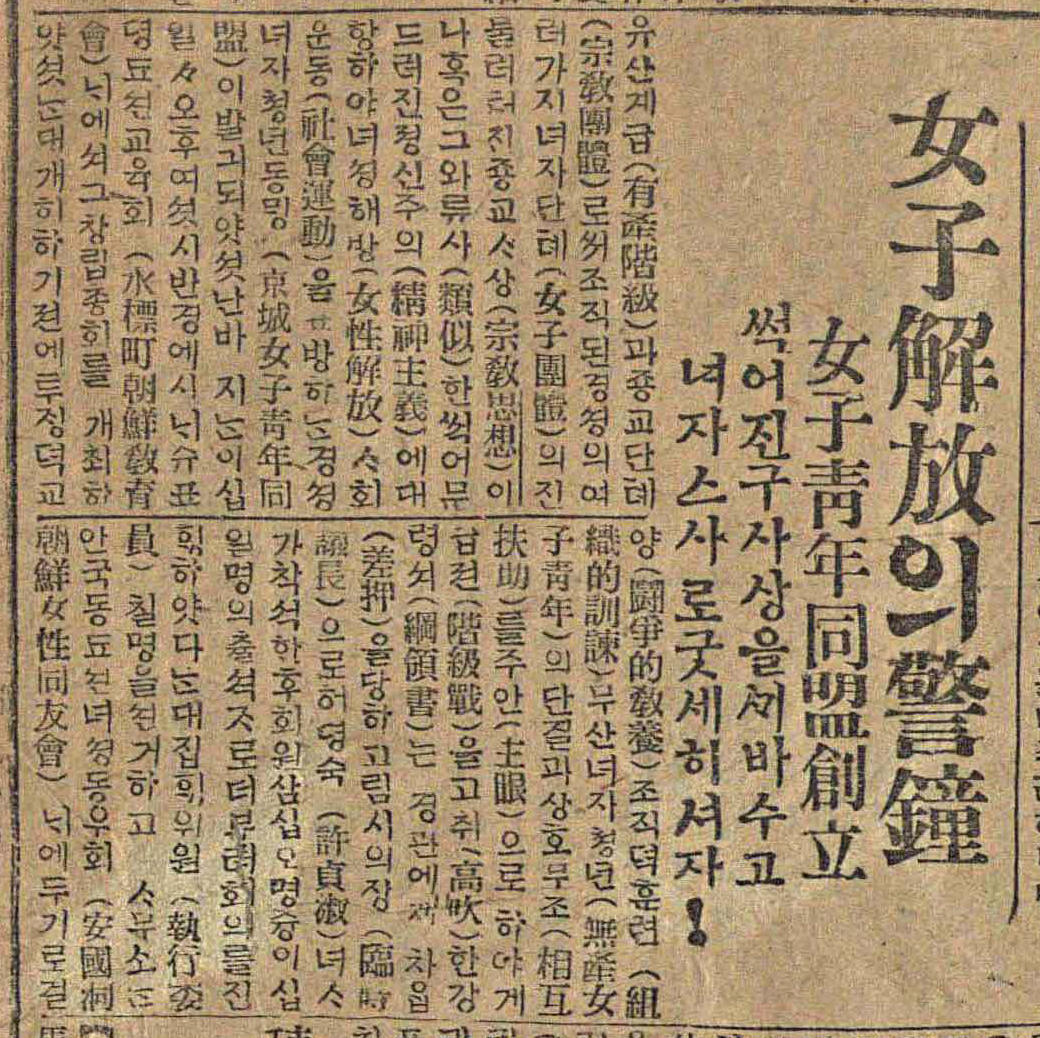 매일신보 1925년 01월 24일자 조선여자청년동맹 창립 발족 기사